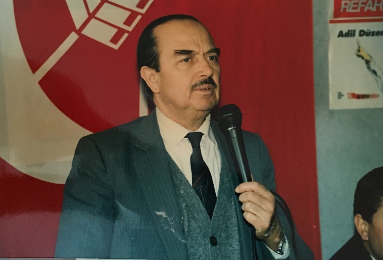 Ahmet Remzi Hatip